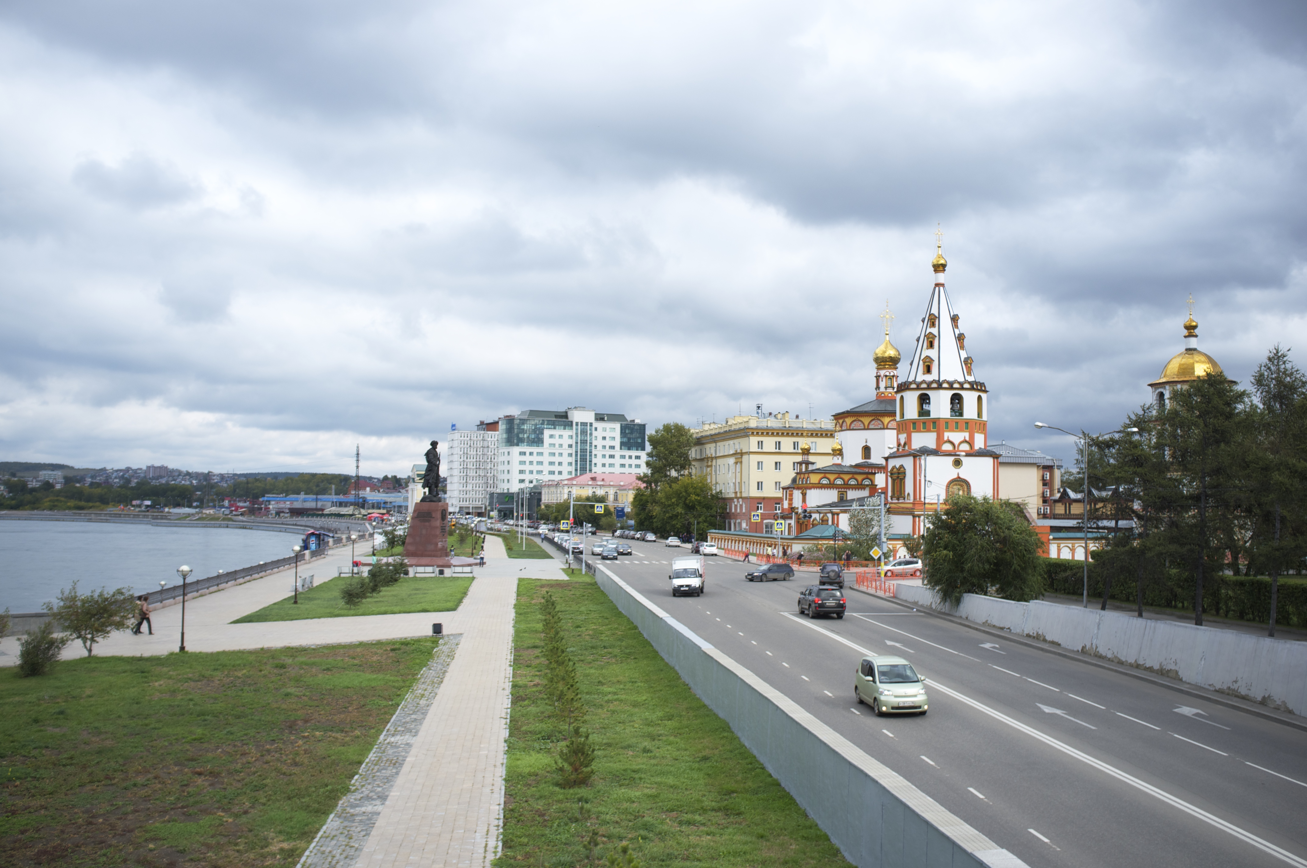 Иркутск. Богоявленский собор и памятник Якову Похабову.